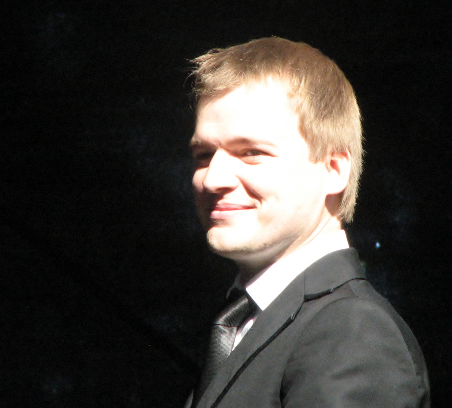 Risto Joost Rahvusooper Estonia 107. hooaja avamisel